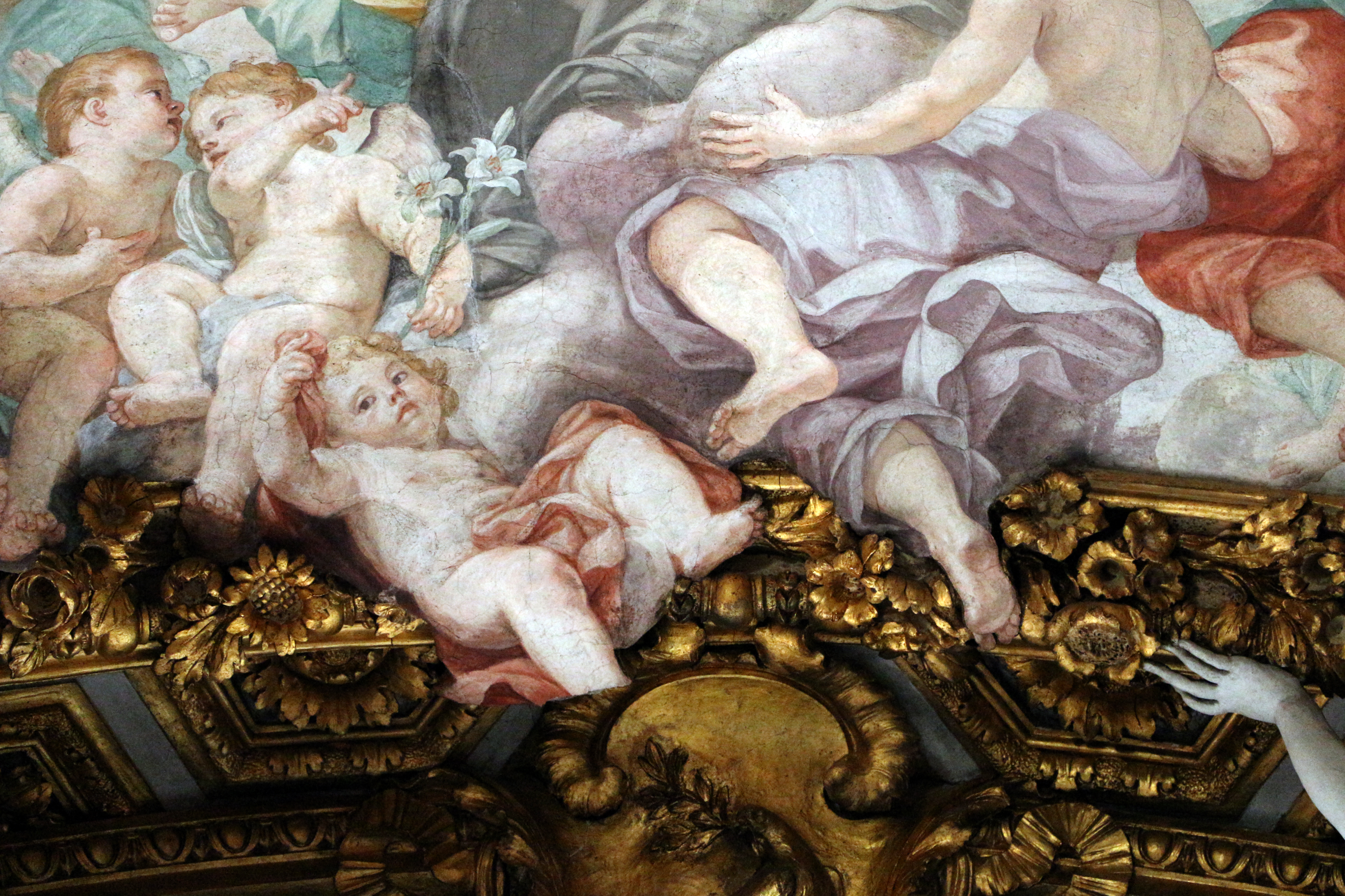 Giovanni odazzi, gloria di san stanislao kostka, 03.JPG